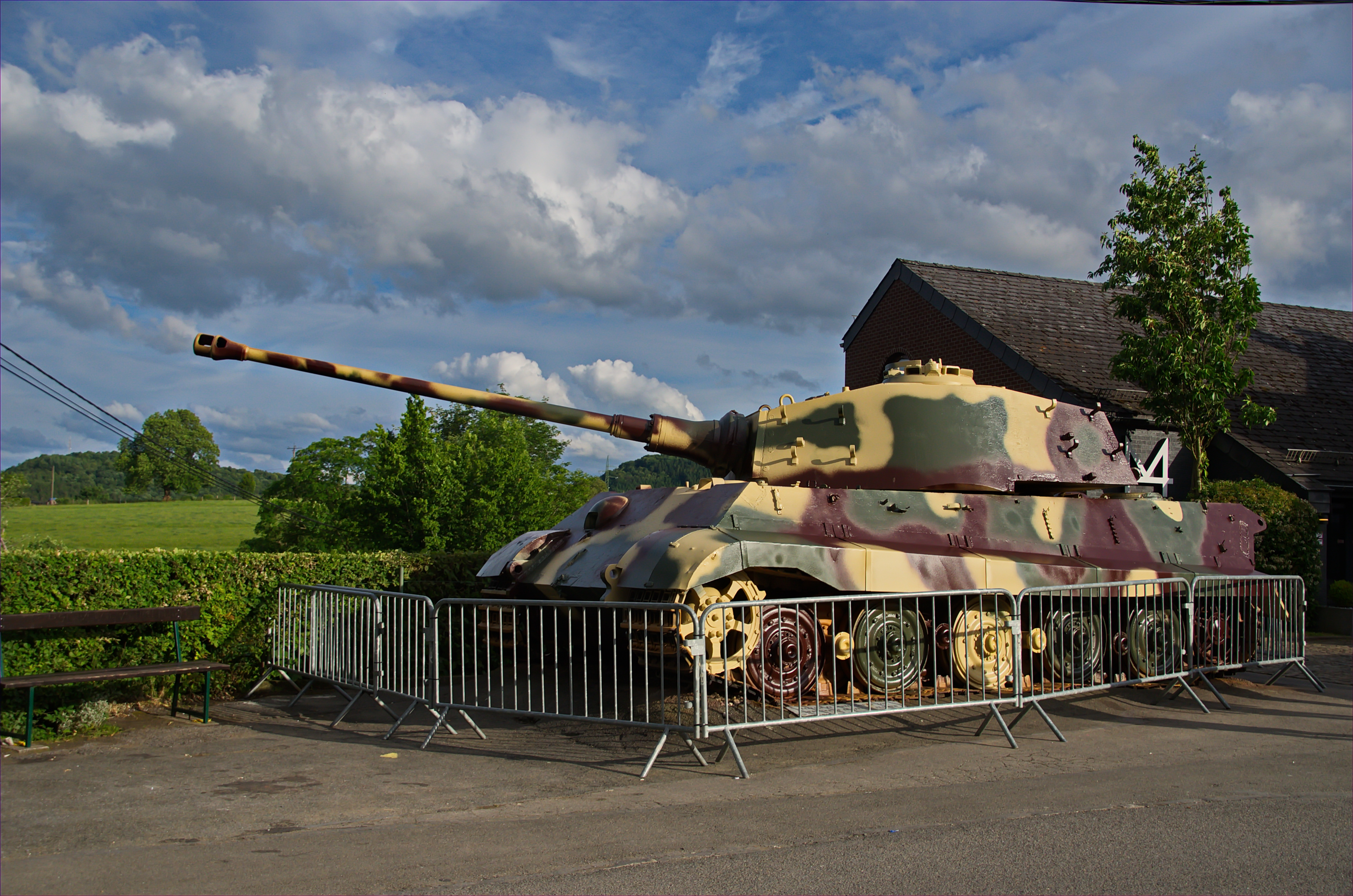 1517 - Belgientour 2015 - La Gleize